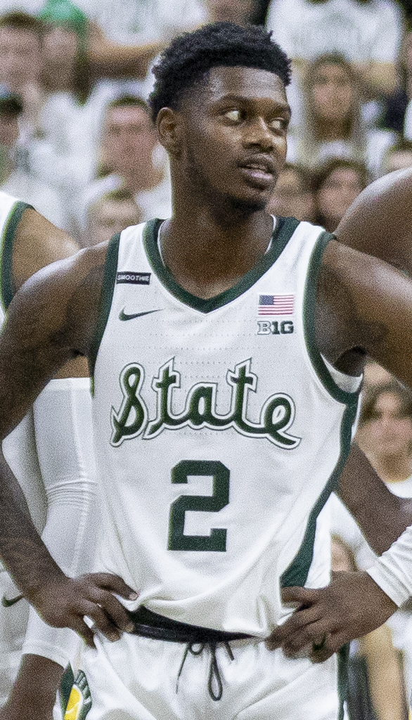 _O6A7616